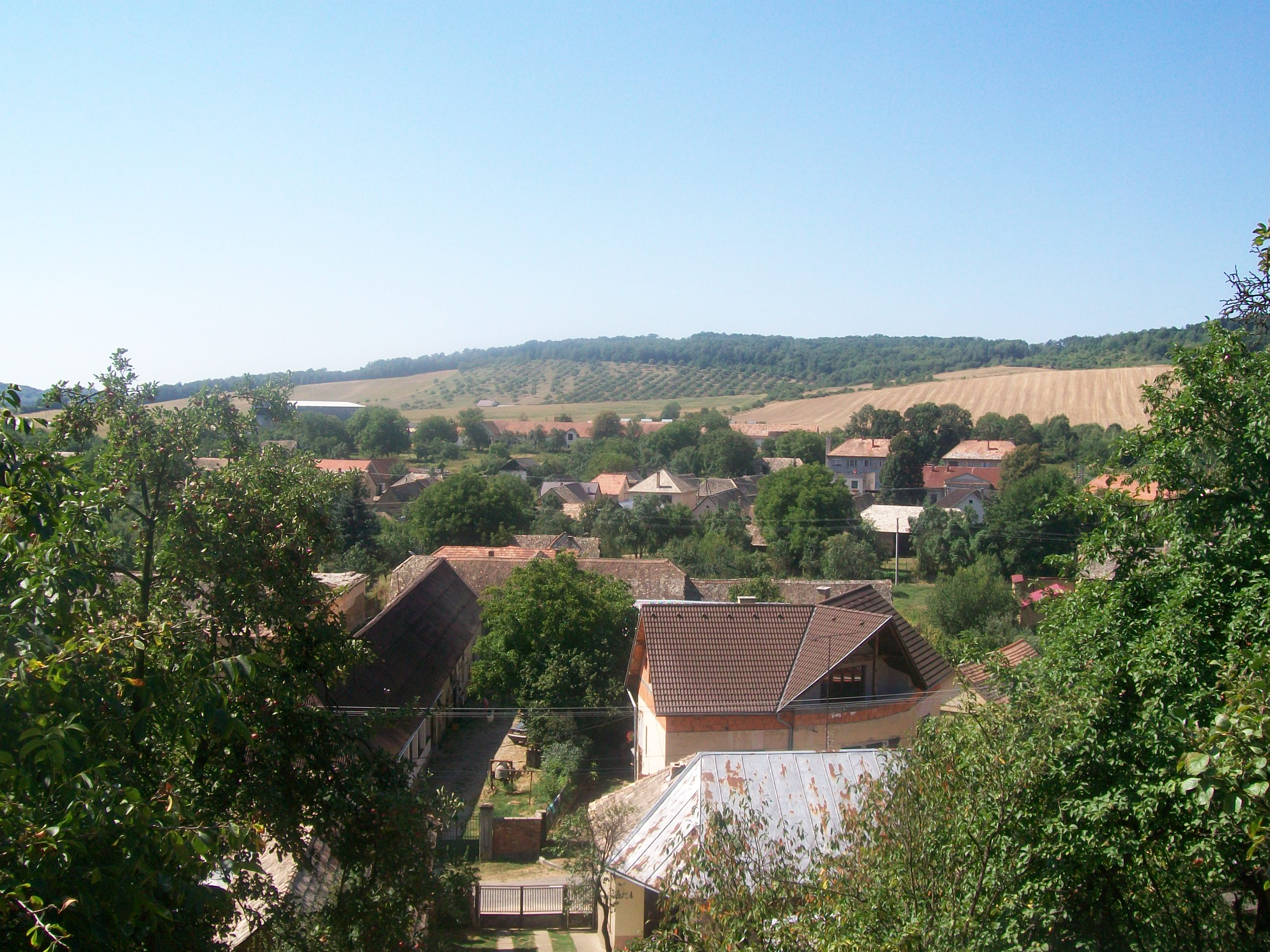 Pohľad na obec Uhorské